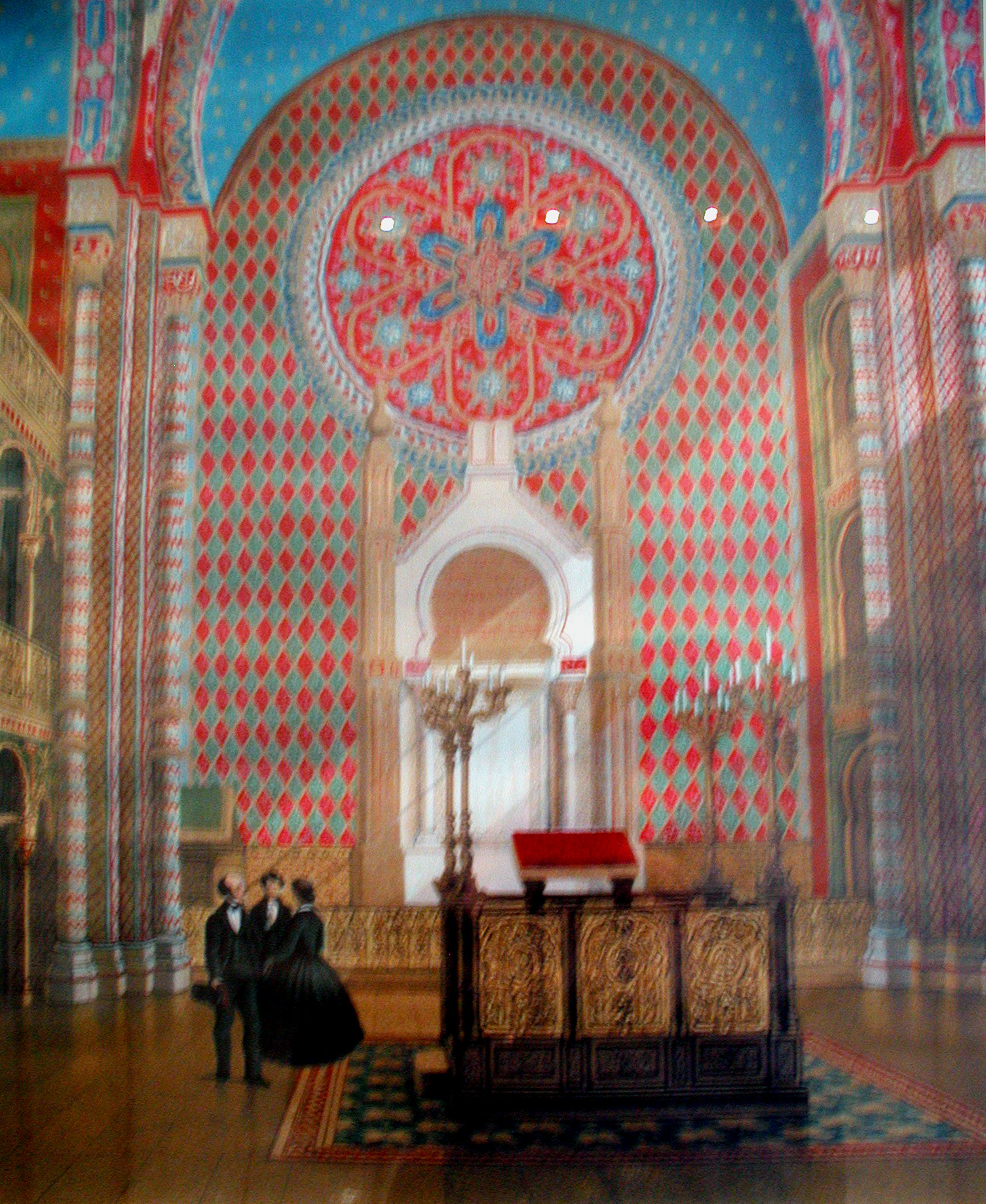 Köln, ehemaligen Synagoge Glockengasse Innenraum